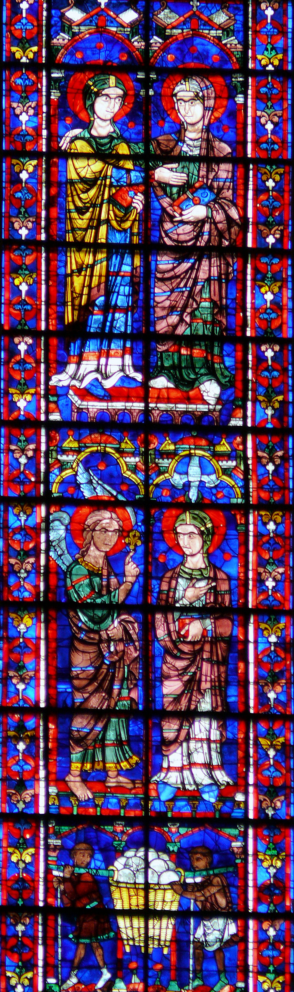 Cathédrale de Chartres - Vitrail haut dans l'axe du choeur (baie n°100) - Annonciation et Visitation (vitrail offert par les boulangers)